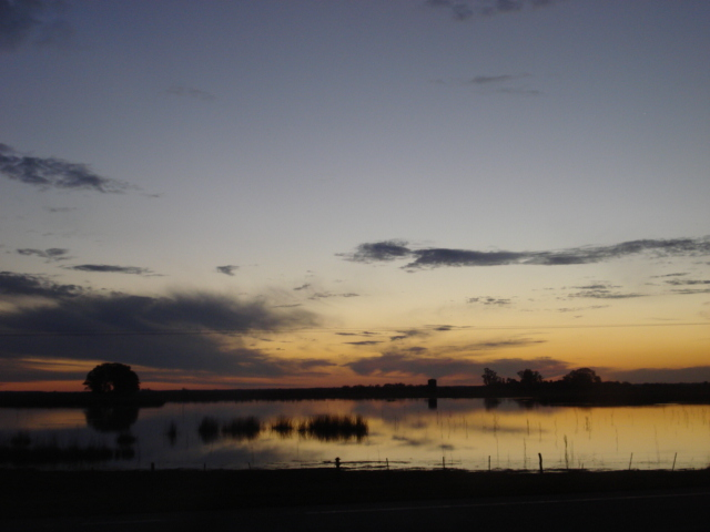 Esta foto fue tomada en un atardercer en el campo en la ciudad de Necochea- Pcia. de Bs As.